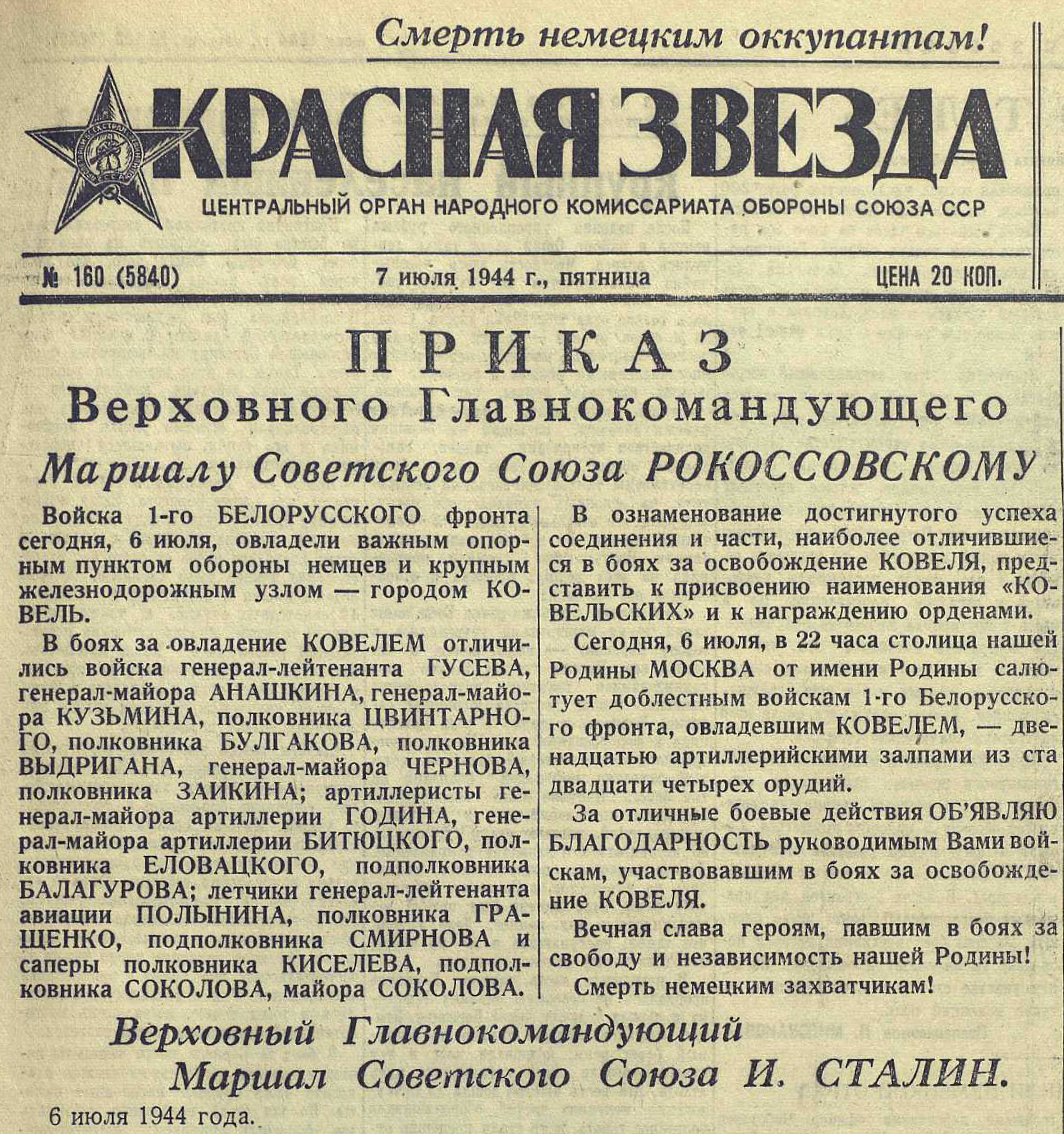 Газета «Красная Звезда» за 7 липня 1944 року з вирізкою приказу щодо нагородження осіб, які відзначились у битві за місто Ковель.